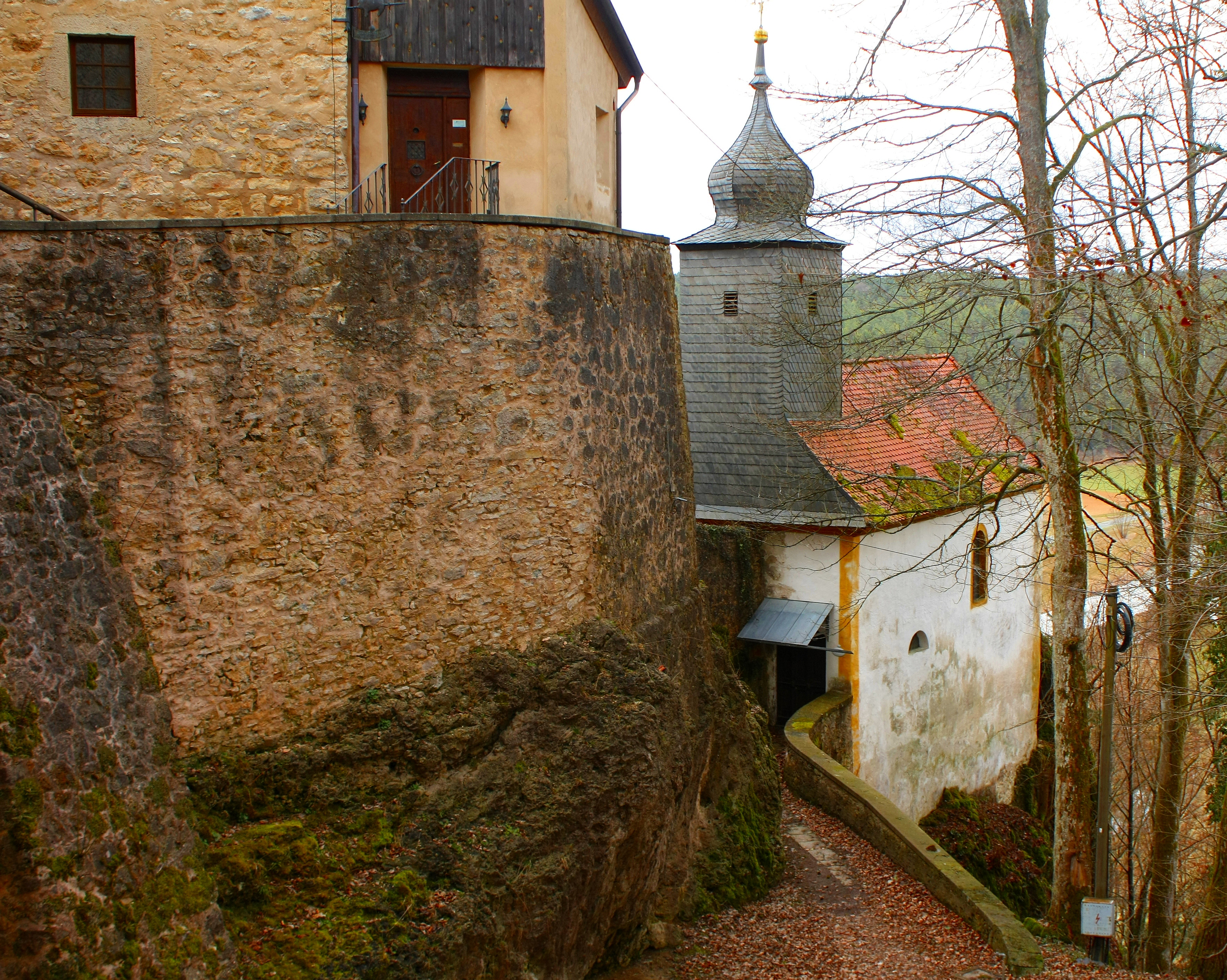 Burgkapelle - auf dem Felssporn - der Burg Rabeneck in Oberfranken